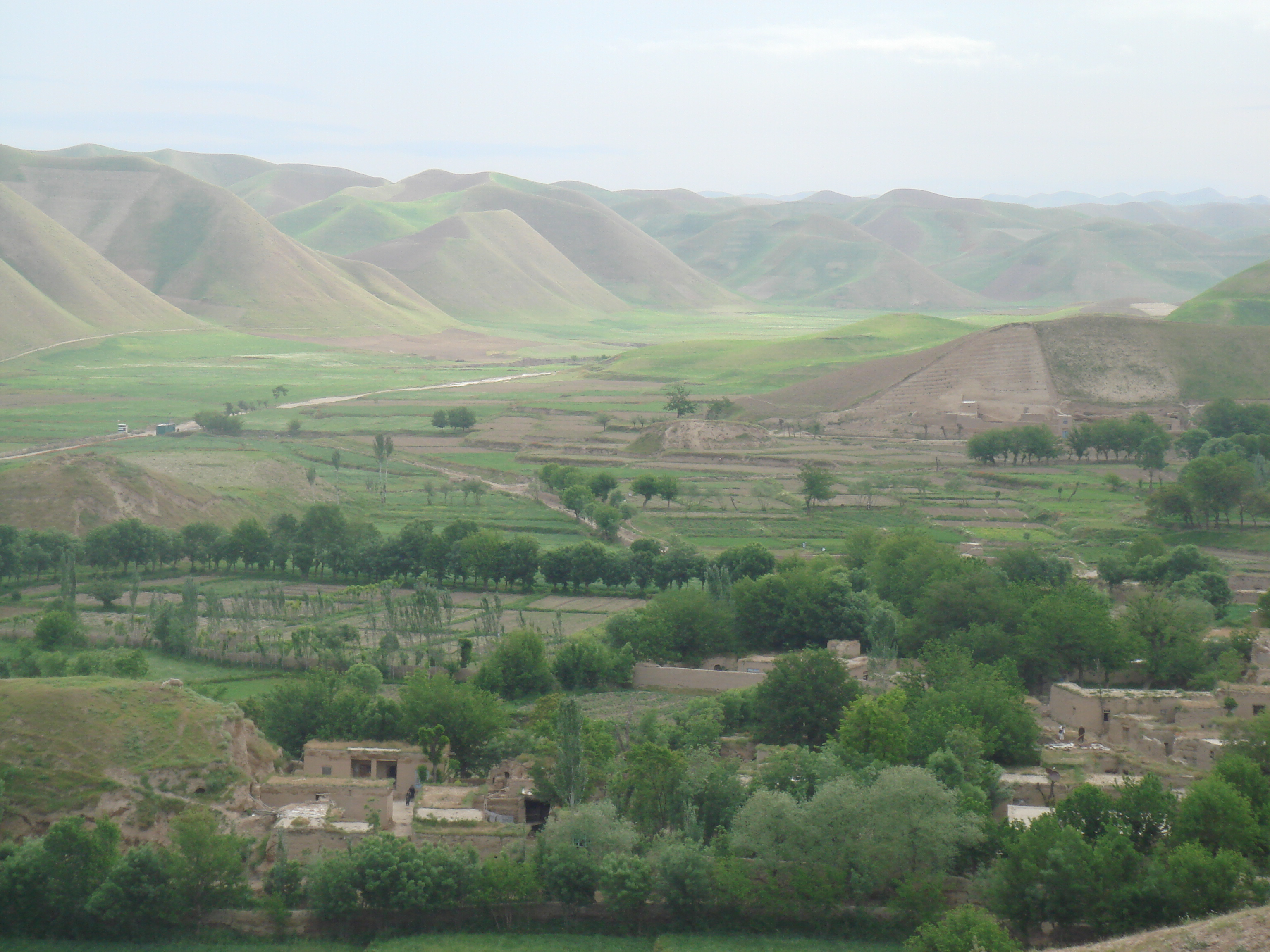 Northwestern Afghanistan